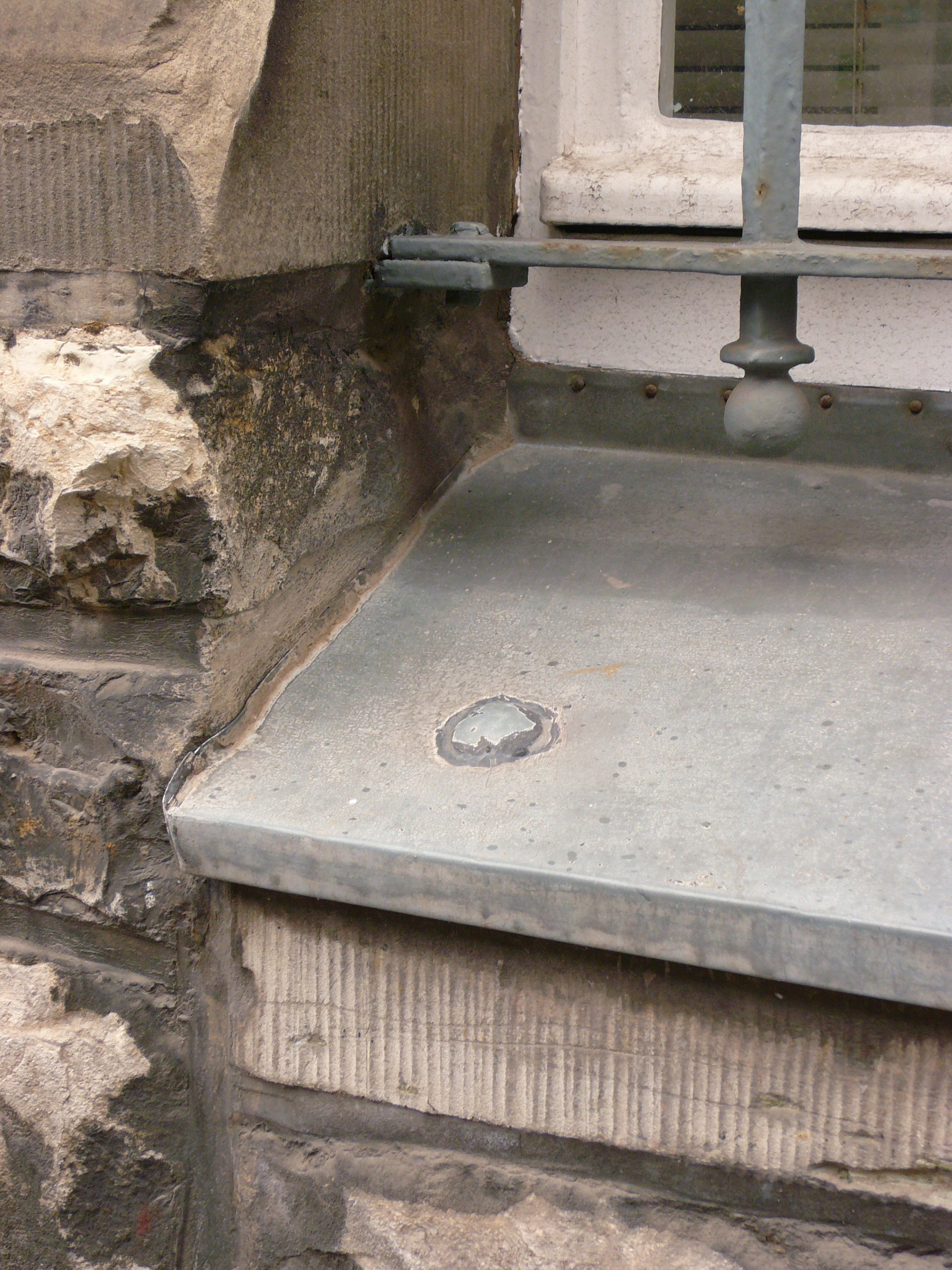 Ecke einer Außenfensterbank mit Hauerbuckel - Abdeckung der Befestigung einer Zinkblechabdeckung